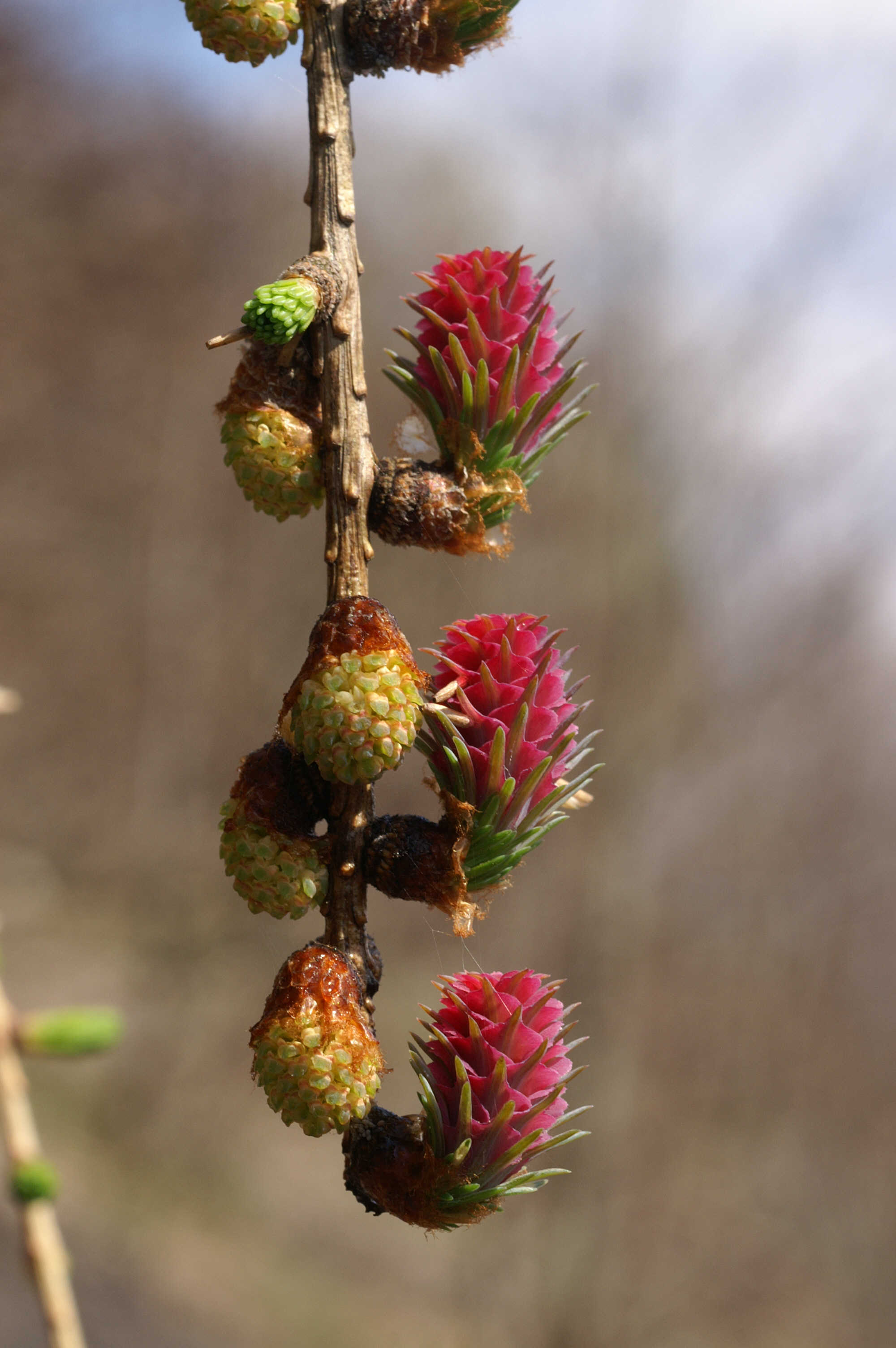 Europäische Lärche (Larix decidua), senkrechter Zweig mit 3 weiblichen und 4 männlichen Blüten, Bergehalde in Ensdorf, Saarland, Deutschland.